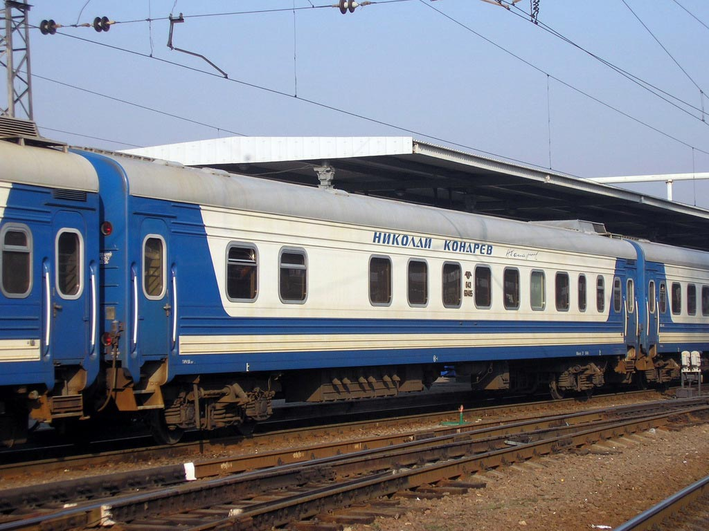 Вагон